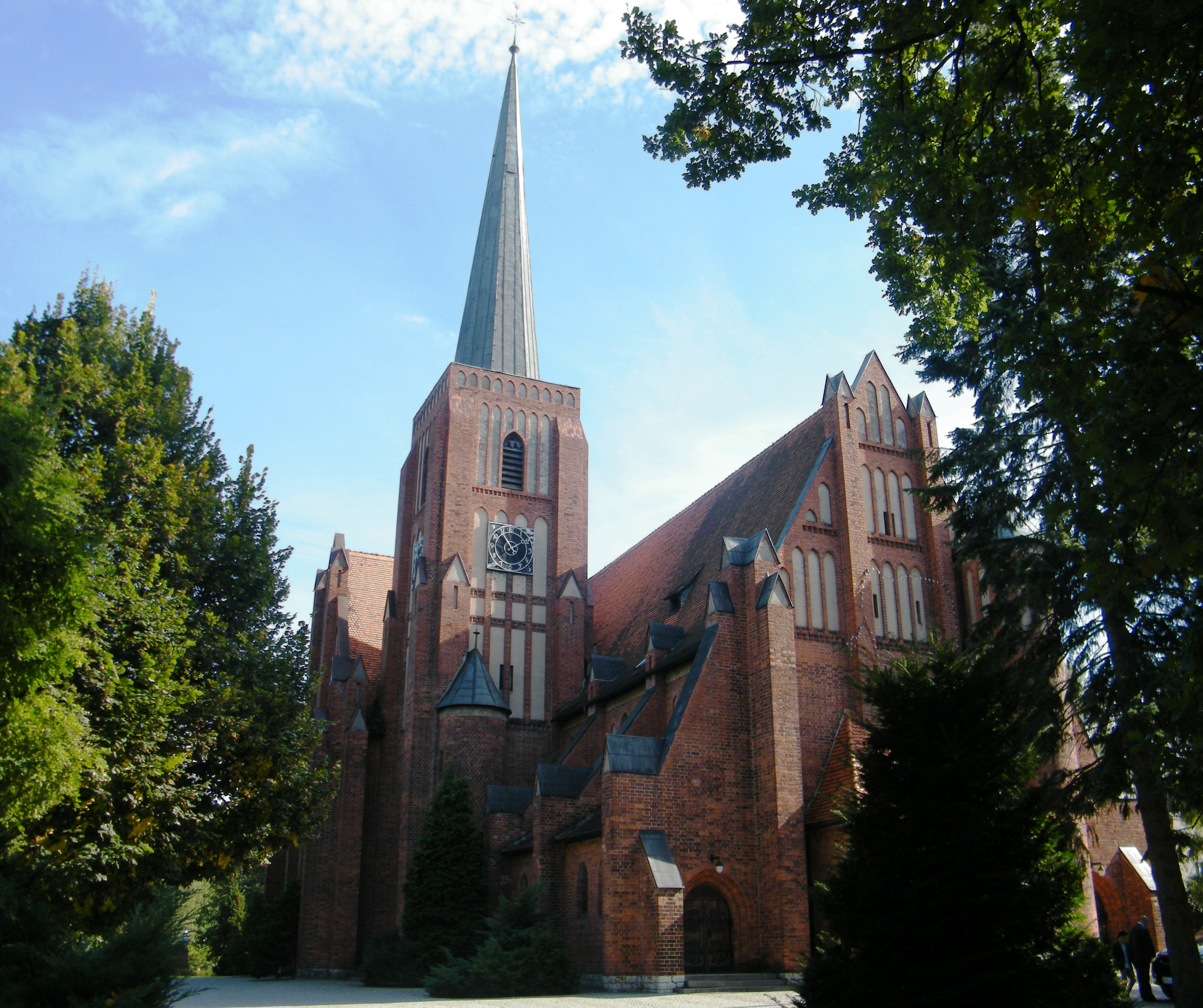 kościół par. p.w. Matki Bożej Wspomożenia Wiernych, 1911-13 Kluczbork, ul. Skłodowskiej 8, Kluczbork